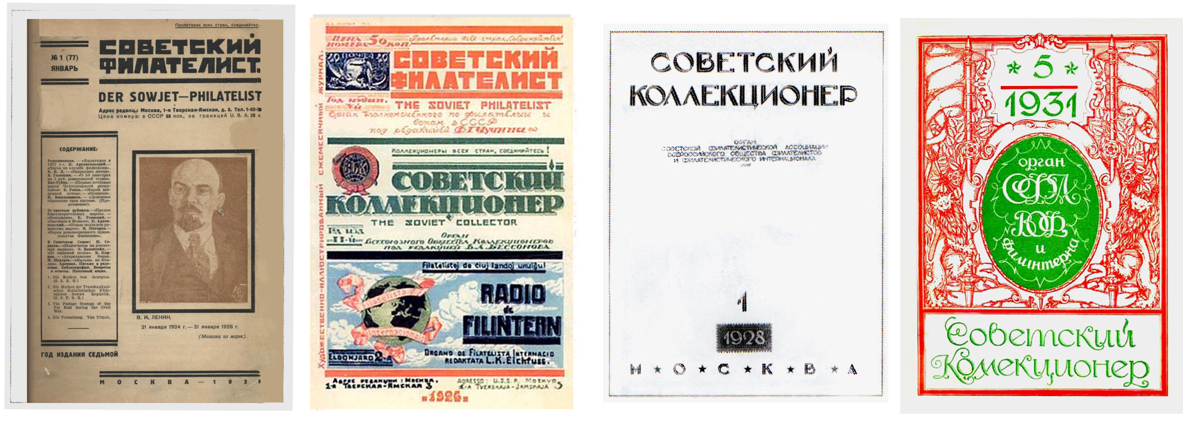 Обложки журнала "Советский филателист" - "Советский коллекционер" в разные годы